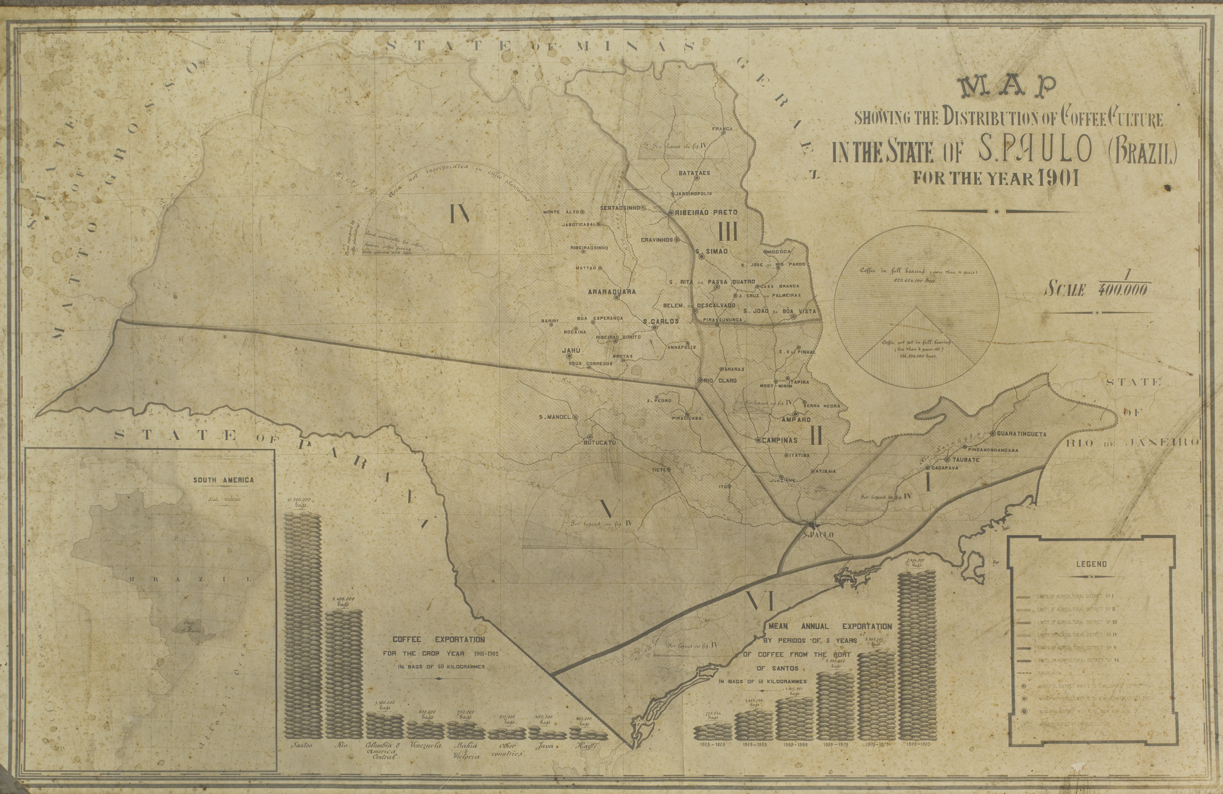 Obra que integra o acervo do Museu Paulista da USP - Ref. Agente: Department of Agriculture, Commerce and Public Works of the State of São Paulo